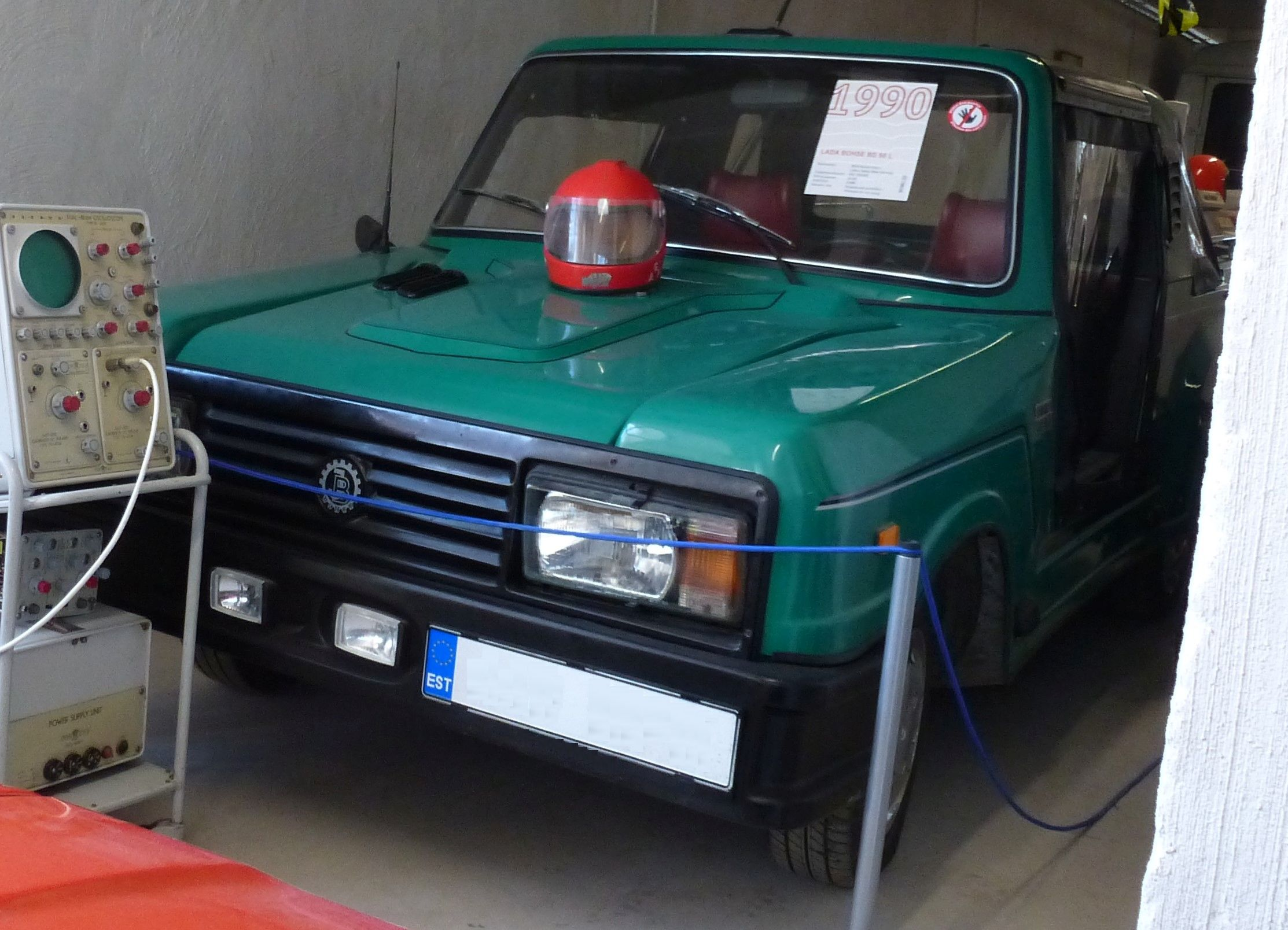 Bohse Eurostar 1990